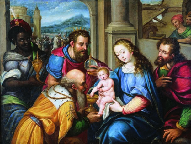 La obra representa el momento en que el Niño Jesús fue adorado por los Reyes magos.